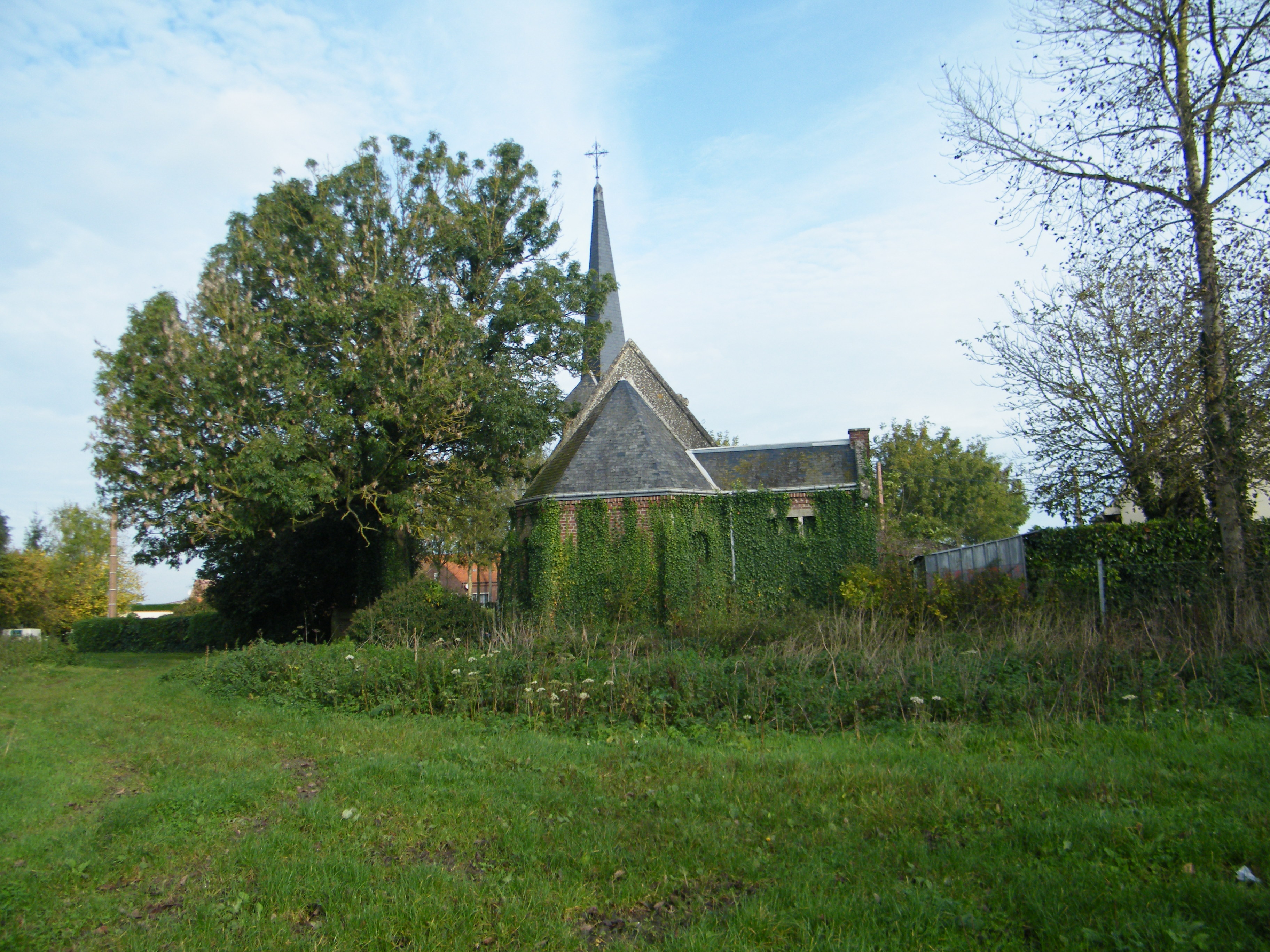 église.